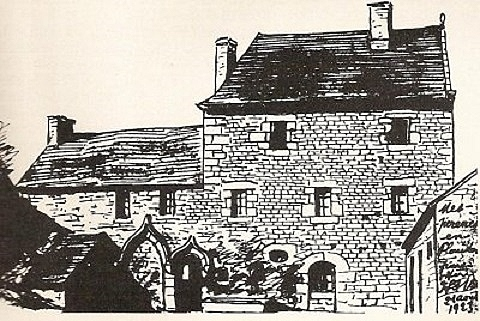 Louis Le Guennec : dessin du manoir de Mespérennez (Mespérennès) qui se trouvait dans la paroisse de Plouider [depuis 1954 dans la commune de Saint-Méen (Finistère)]